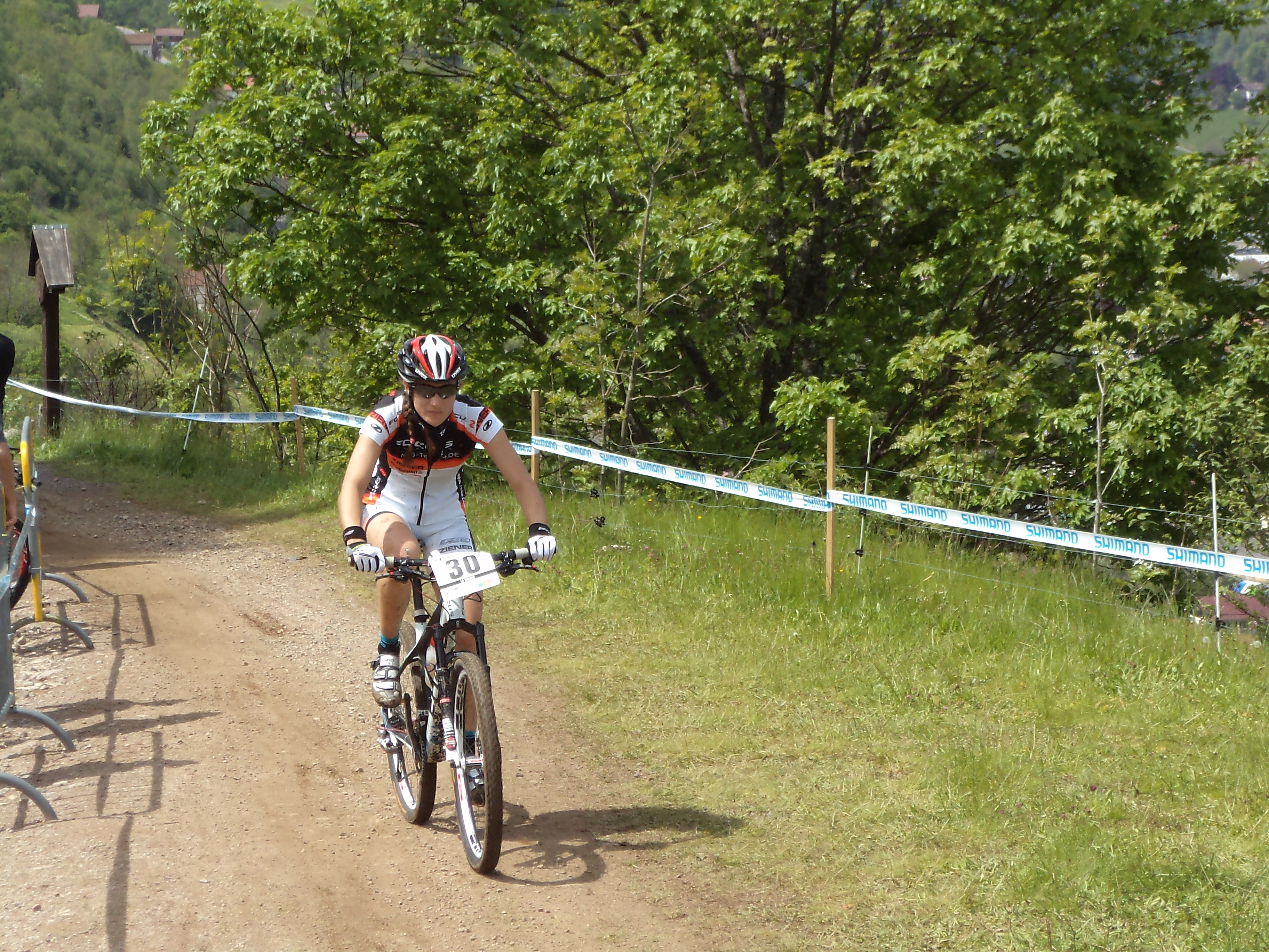 Julie Krasniak lors de la 4e manche de la coupe du monde de VTT 2012 à La Bresse (FRA).